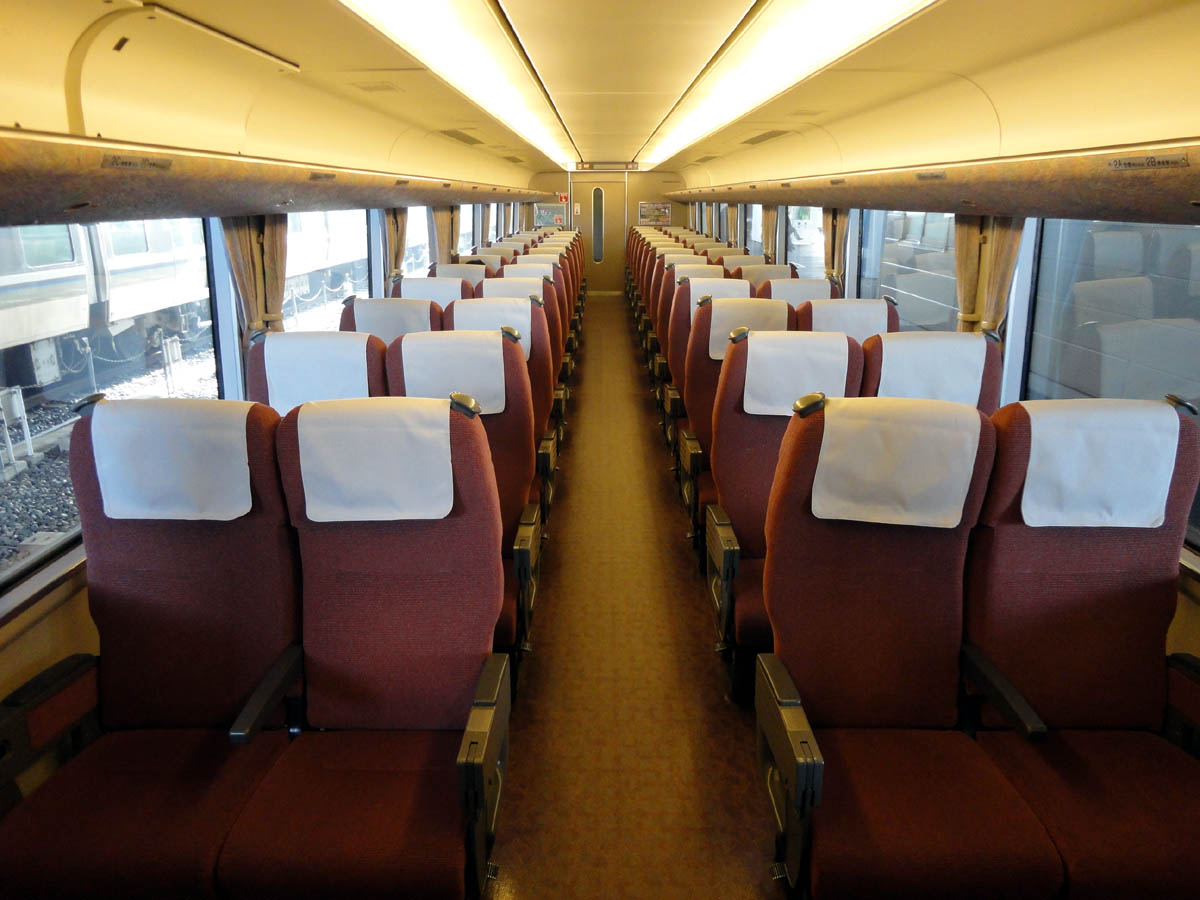 JR西日本 683系2000番台（普通車車内）